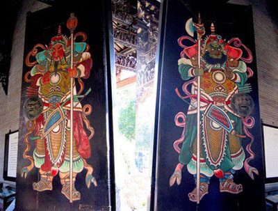 Left: Qin Shu-bao; Right: Yu-chi Gong